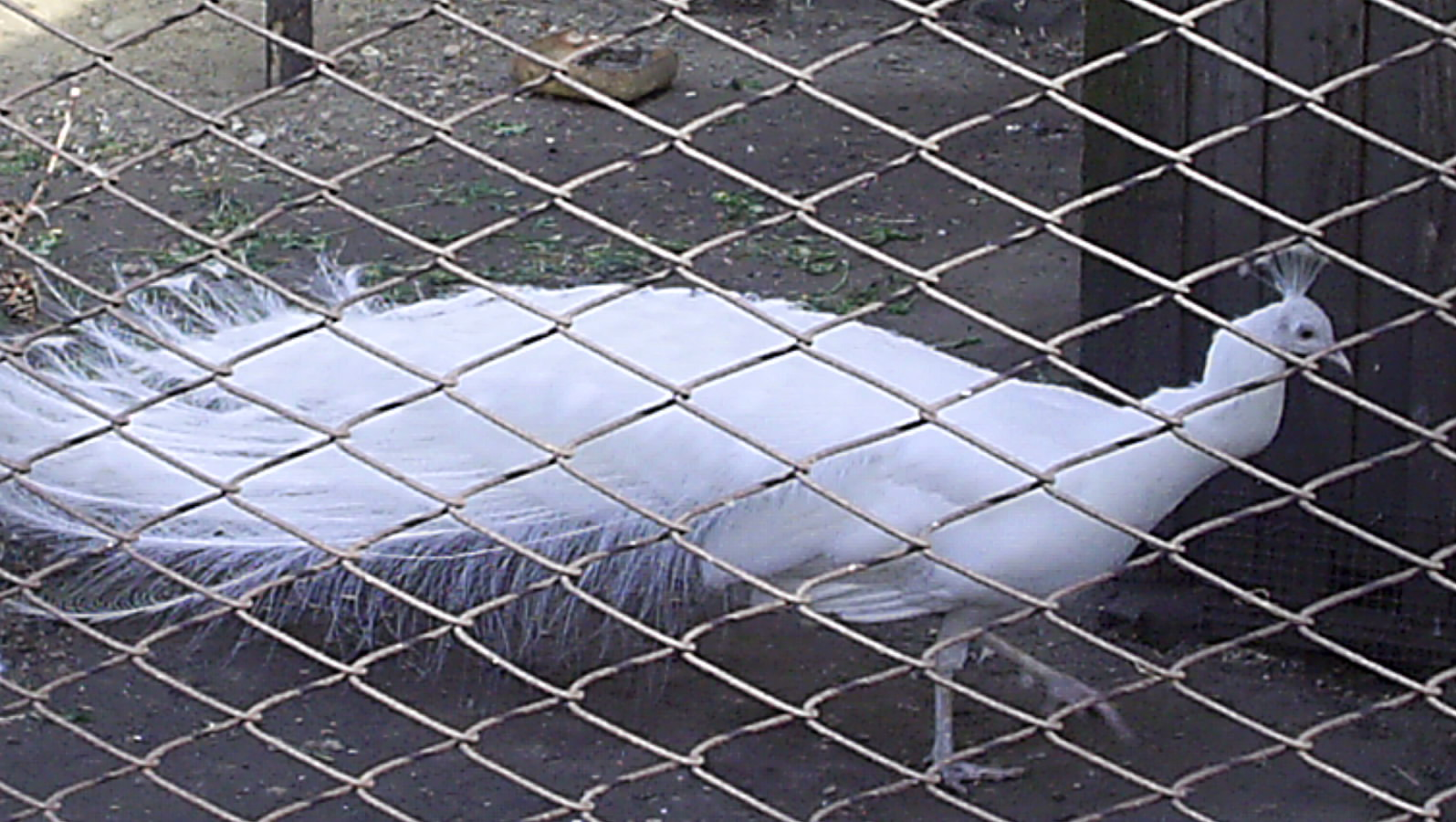 Пензенский зоопарк. Белый павлин